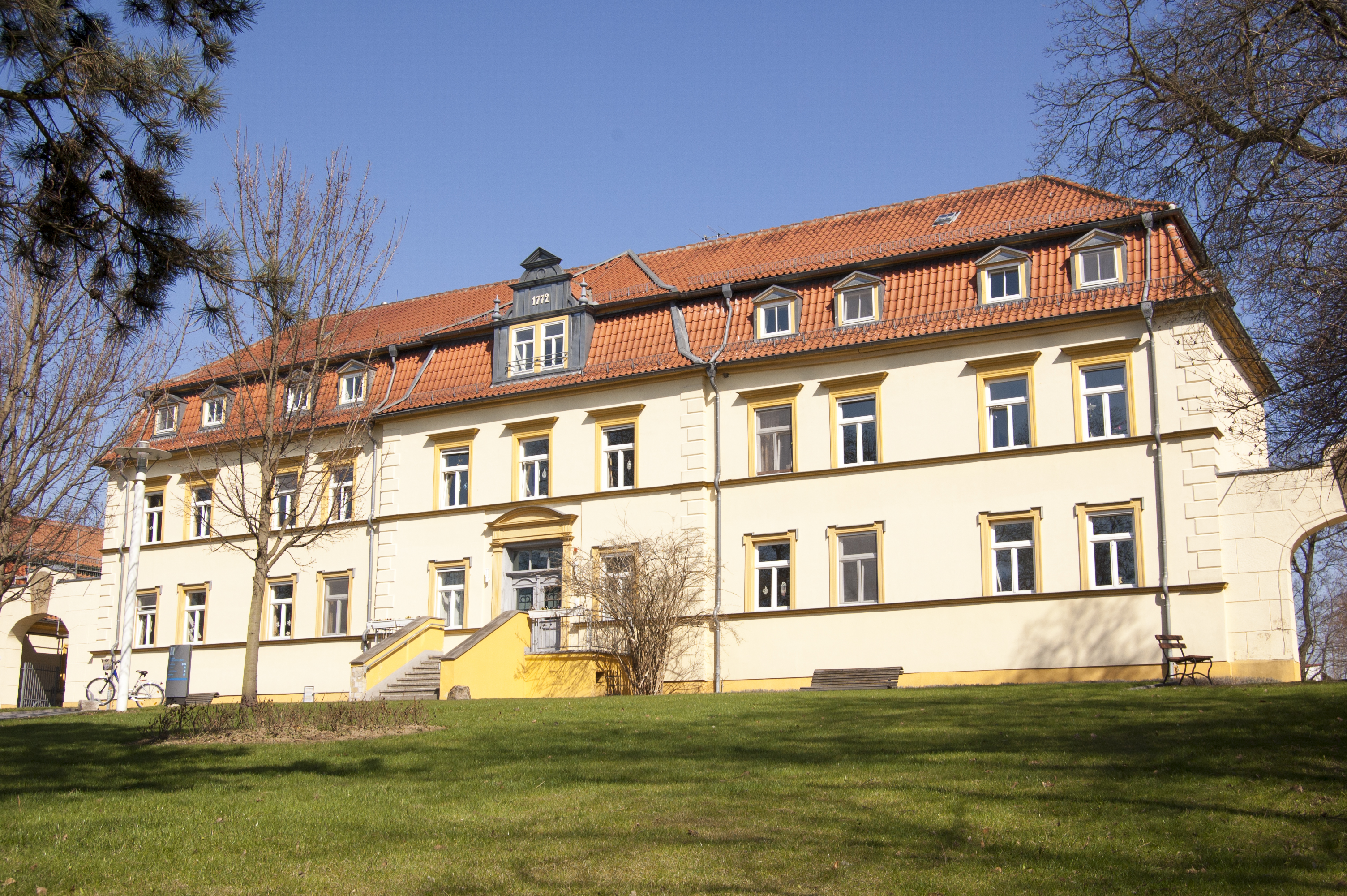 Frontansicht des Hauptgebäudes